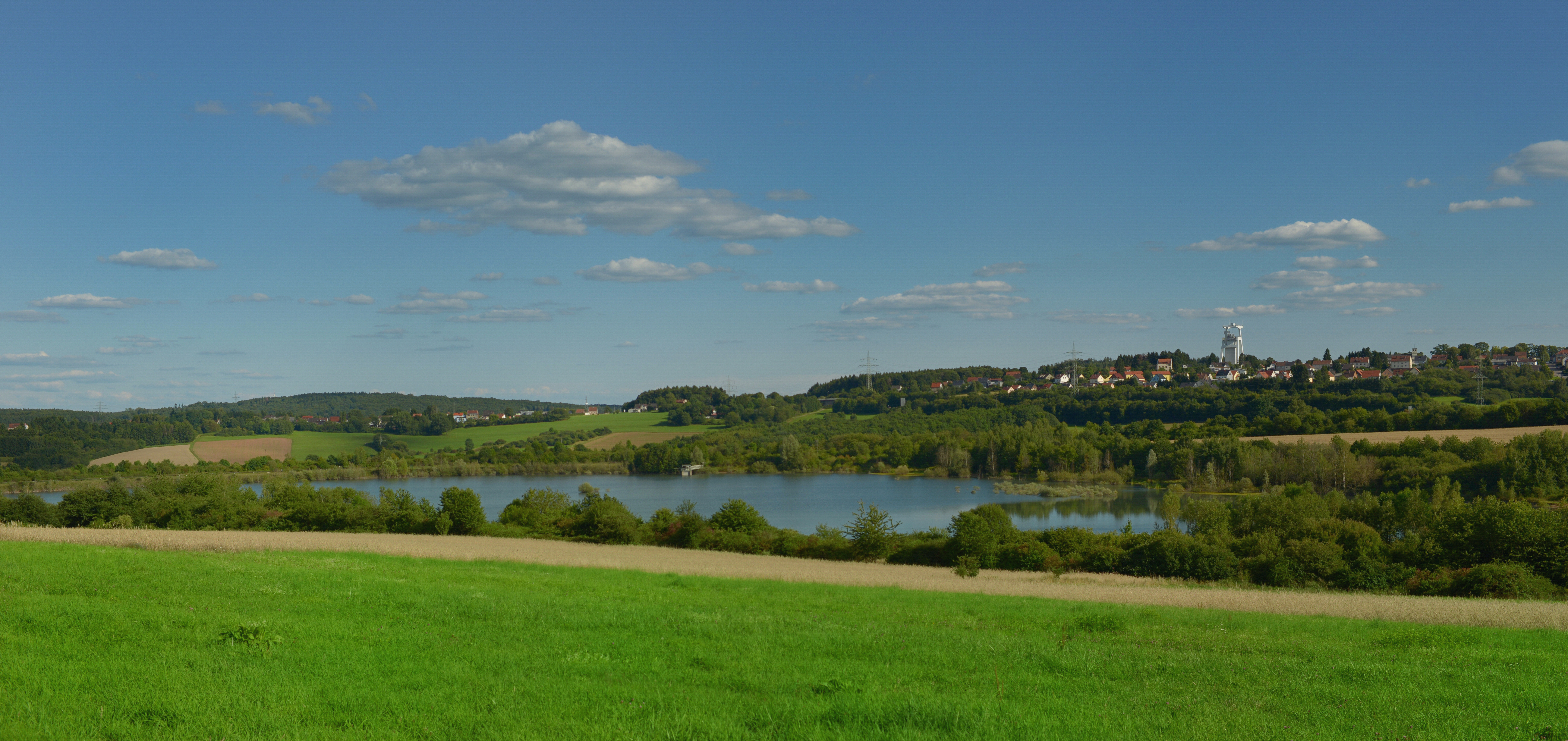 Schlammweiher Hahnwies der ehemaligen Grube Göttelborn, Blick von Steinertshaus Richtung Damm. Heute Teil der Landschaft der Industriekultur Nord (LIK.Nord), Naturschutzgroßprojekt, Landschaftslabor Vogelzug und wilde Weiden. Im Hintergrund ist das Fördergerüst Schacht IV ("Weißer Riese") der ehemaligen Grube Göttelborn zu sehen (2017).